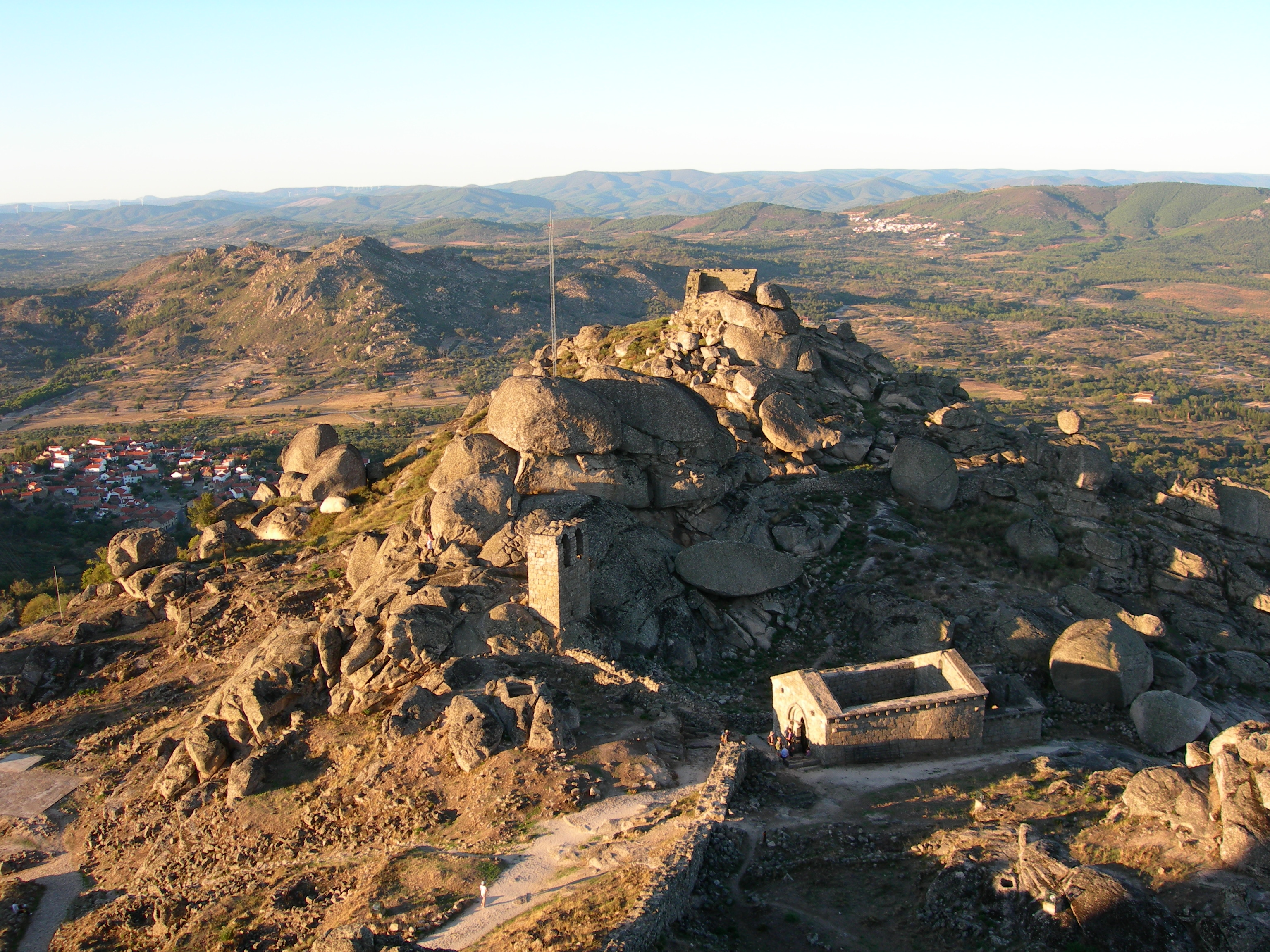 Castelo e muralhas de Monsanto II This monument is classified as Monumento Nacional. This file was uploaded for Wiki Loves Monuments in Portugal with the unique identifier 69865.